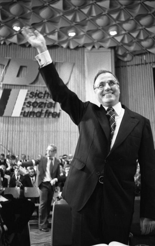 CDU-Wahlkundgebung mit dem CDU/CSU-Kanzlerkanditaten Helmut Kohl in der Beethovenhalle, Bonn